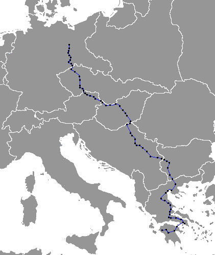 Az olimpiai fáklya útvonala az 1936-os berlini olimpiára